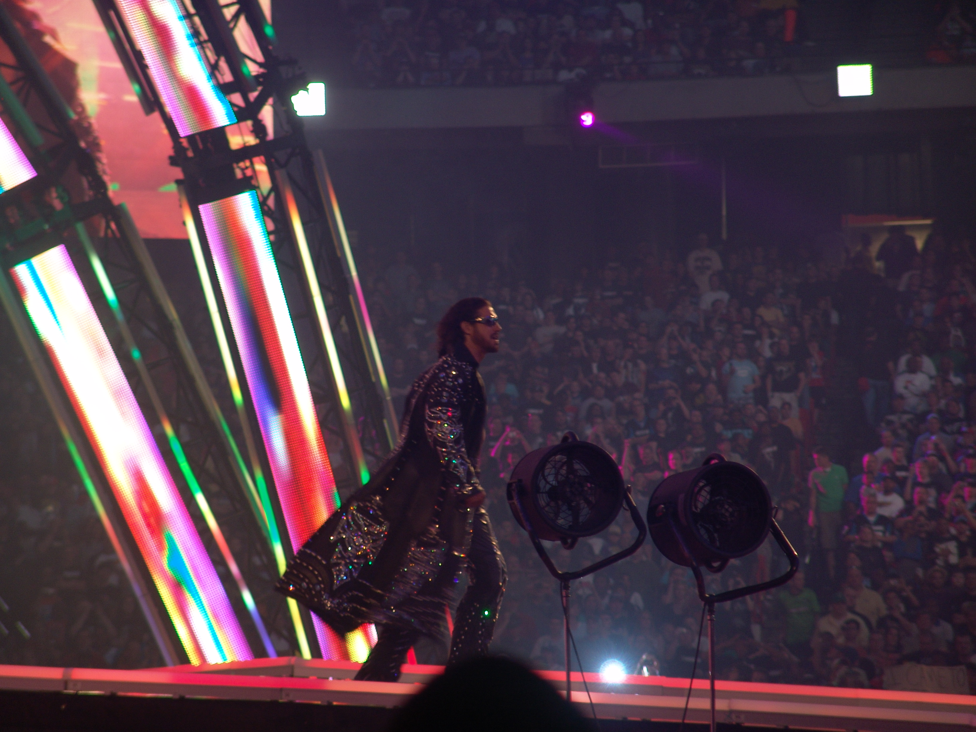 Morrison entrando en WM 27